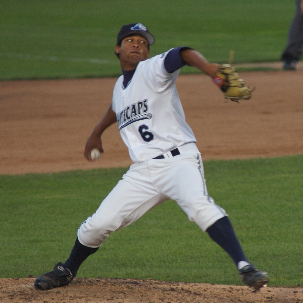 Luis Marte